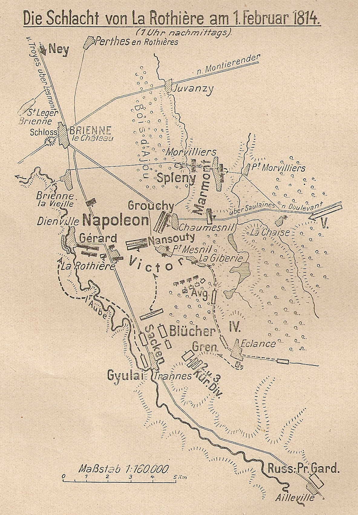 Plan der Schlacht bei La Rothiére